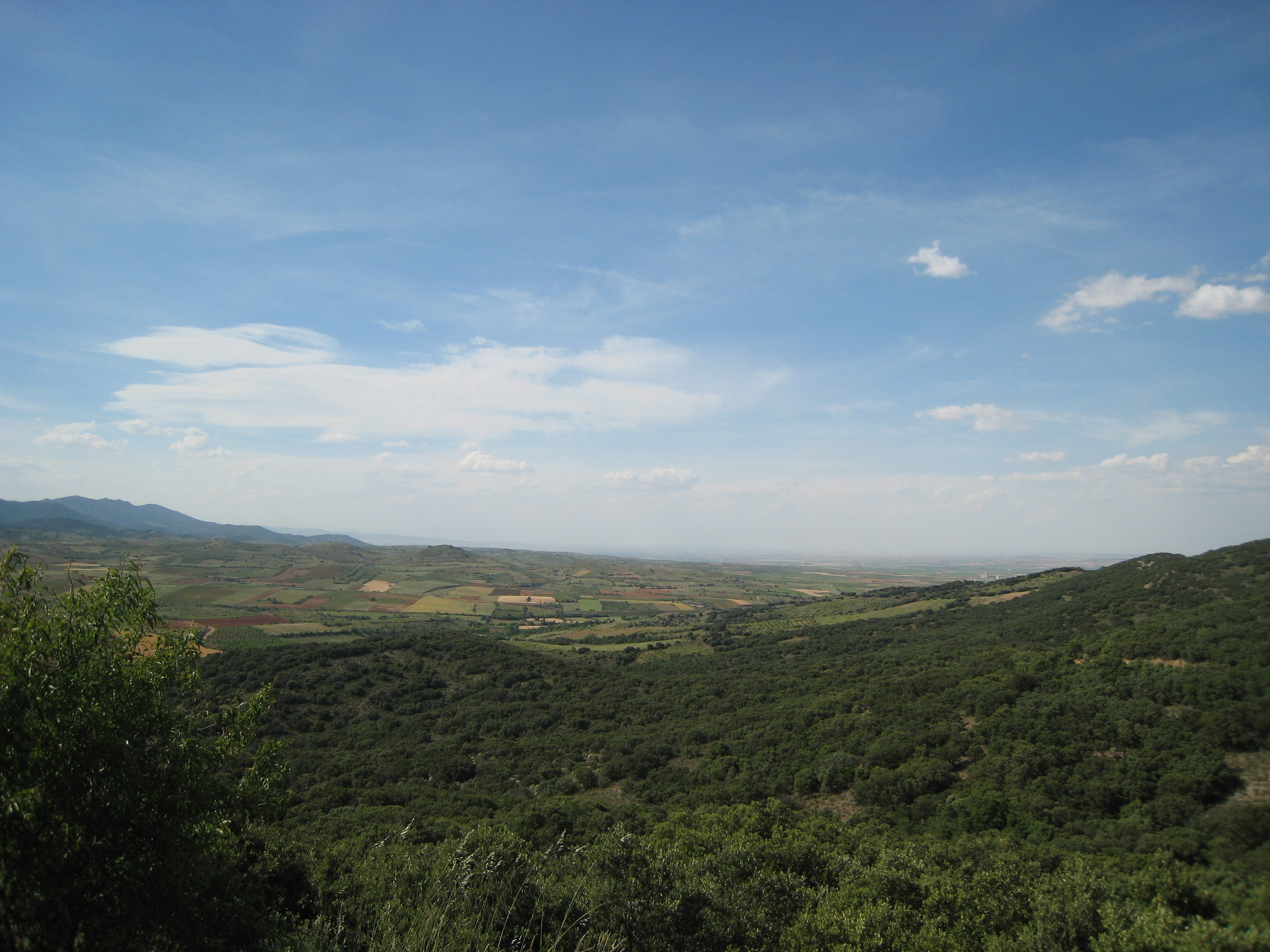 Un de moitos vales en Aragón, espectaculares...cerca de Manchones